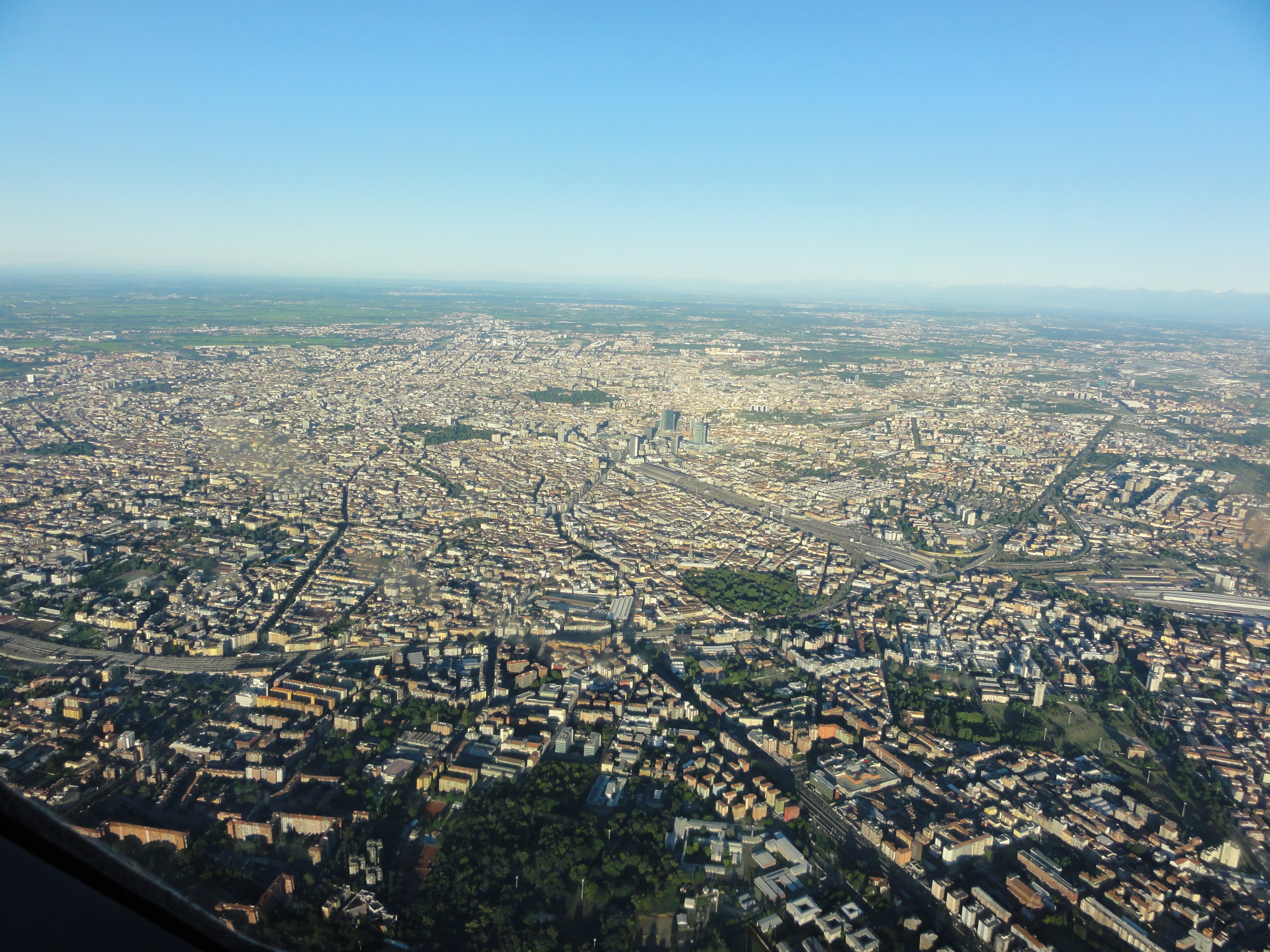 Grande Milano (SRN 7A)